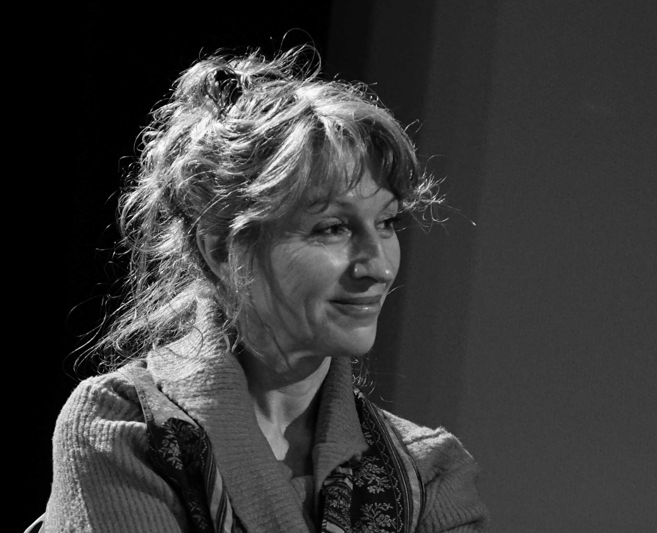 festival de littérature nomade du grand est.